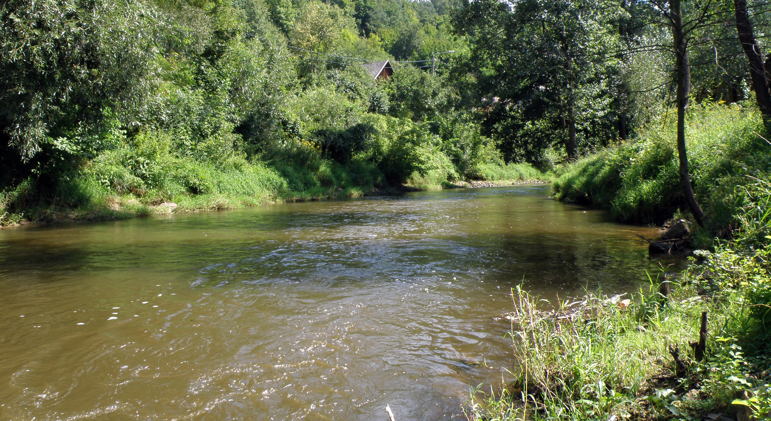 Bałtów - rzeka Kamienna